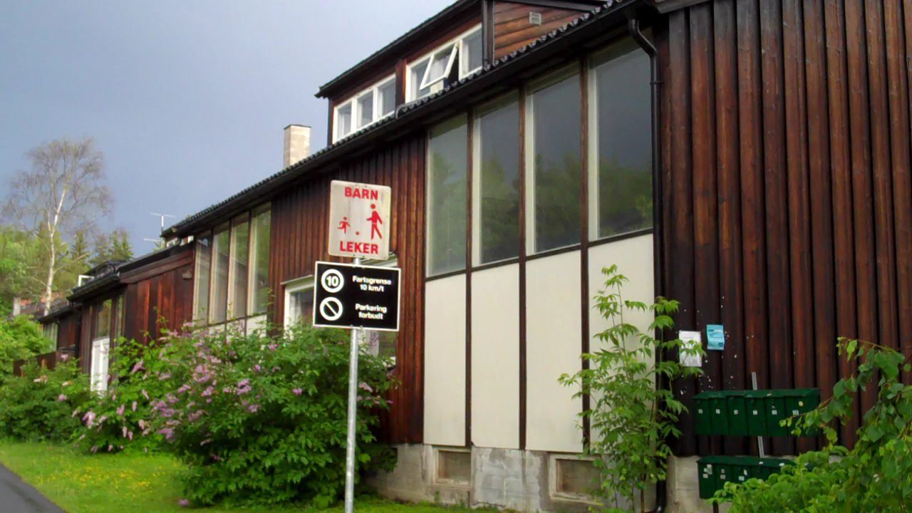 Trolltun Borettslag på Bøler i Oslo.